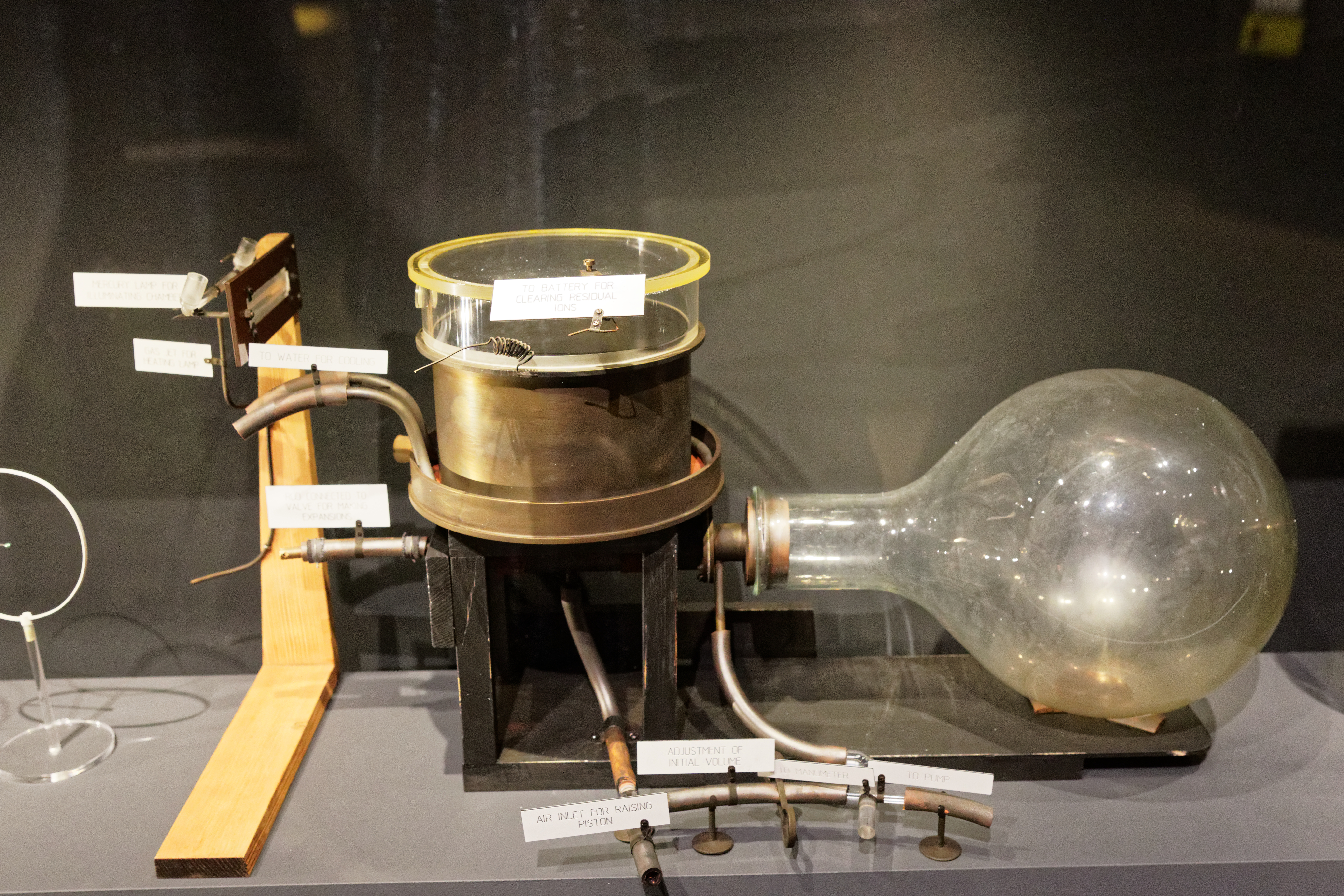 Réplique de la chambre à brouillard de Charles Wilson.